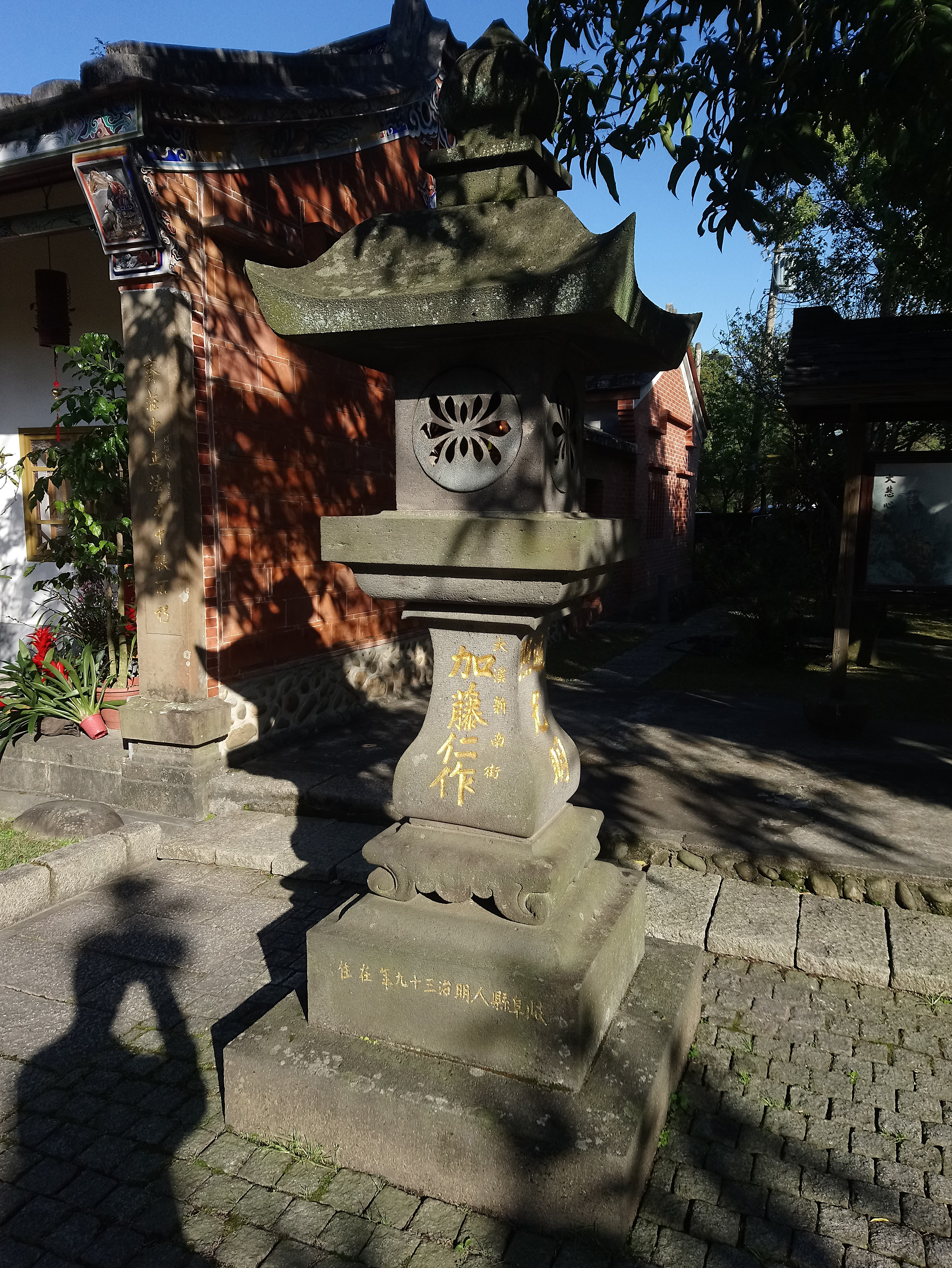 大溪齋明寺石燈籠,桃園市大溪區光明里